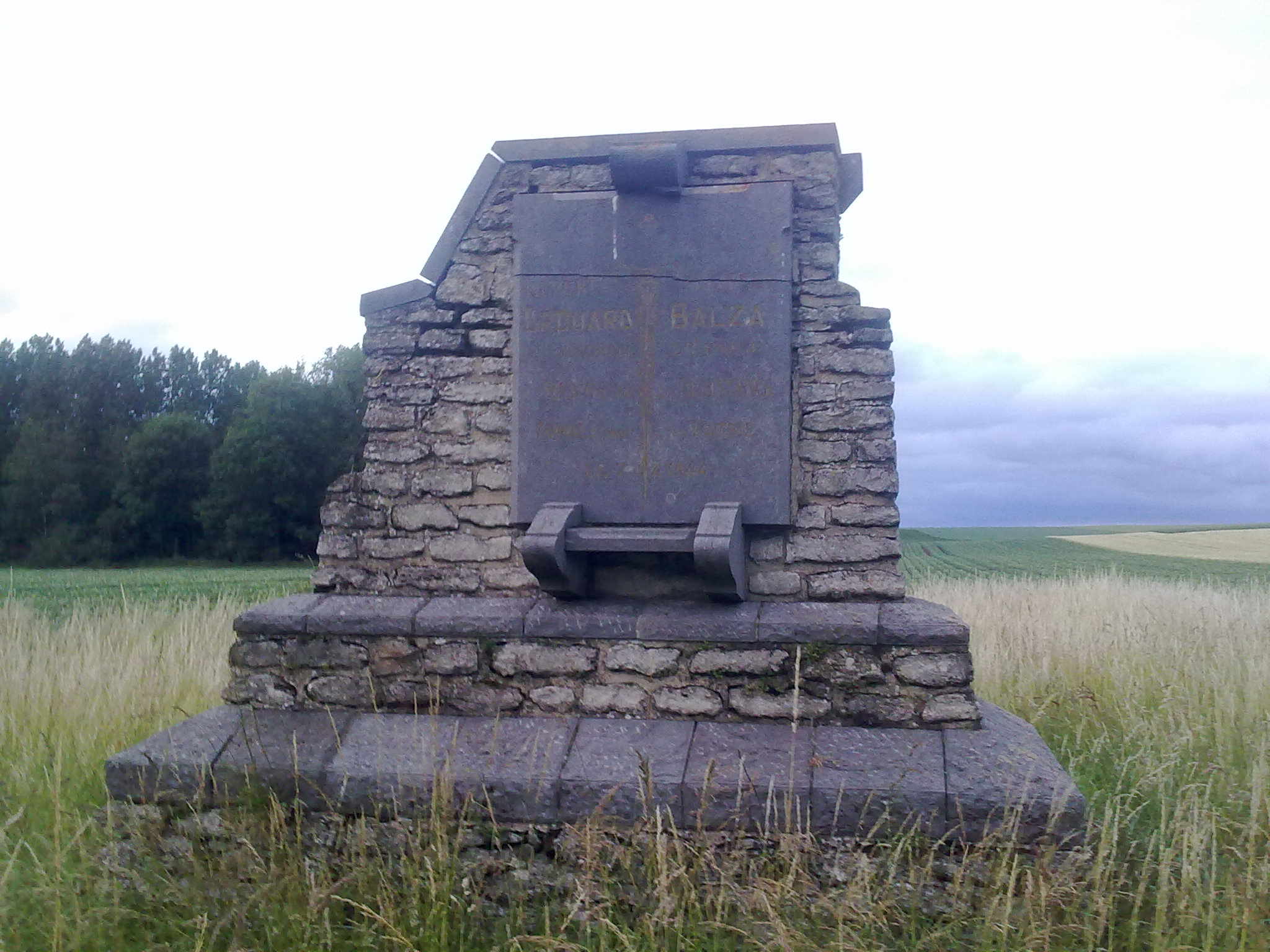 Cénotaphe à deux résistants : Albert DROUARD de Sauvenière et Georges BALZA d'Ernage, morts le 7 septembre 1944. le long de la N4 vers Nil St Vincent, Walhain.